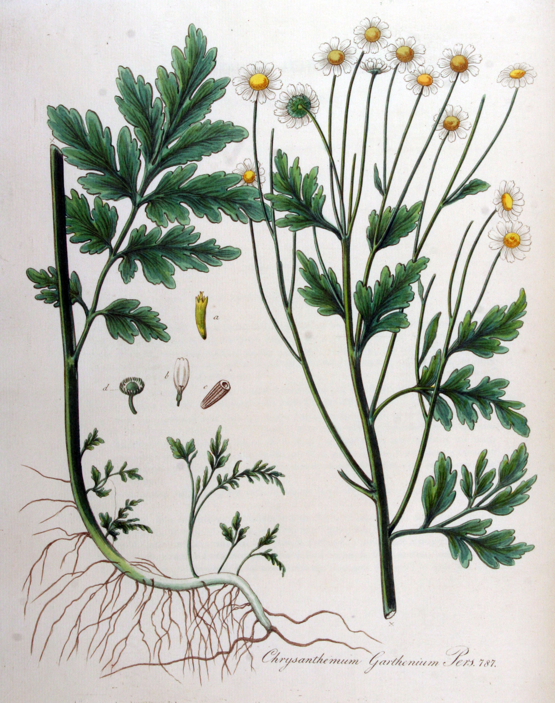 Tanacetum parthenium (L.) Schultz-Bip. (Syn. Chrysanthemum parthenium (L.) Bernh.)